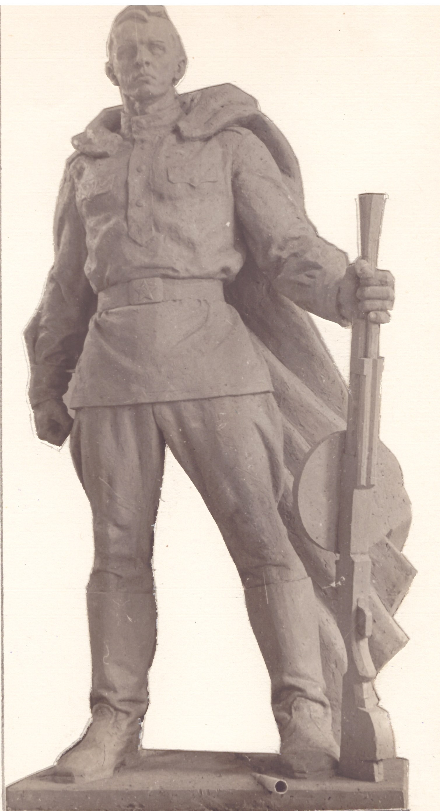 Пам’ятник загиблим воїнам-односельчанам в роки Великої Вітчизняної війни 1941-1945 р.р. С. Івашківці Новоград-Волинський район Житомирська область. 1977. Скульптор Таранченко В.О. Литий бетон.